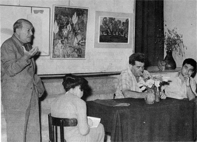 יוסף זריצקי מברך בטקס חלוקת פרס ההסתדרות לאמני ההיישבות העובדת. אפריל 1961. צילום: א. ארדה